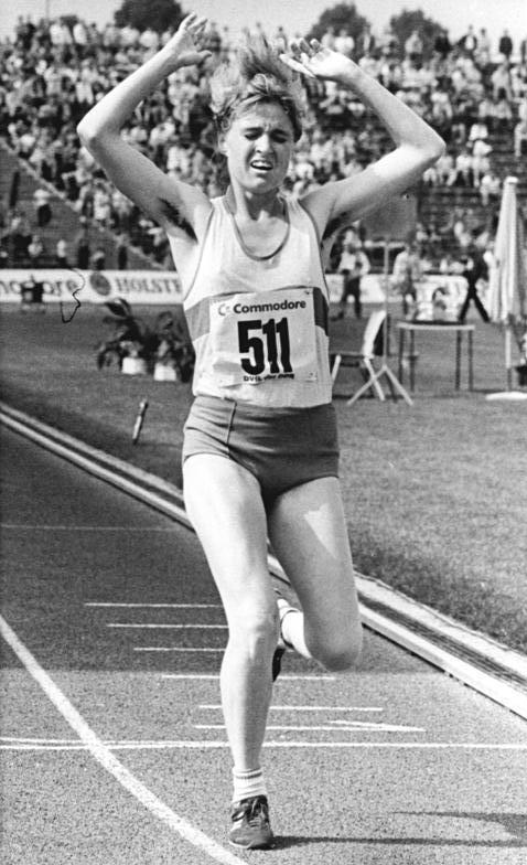 Beate Anders ADN-ZB Kluge 26.6.88 Rostock: 39. DDR-Meisterschaften in der Leichtathletik - Einen DDR-Rekord im 5.000 Meter Gehen der Frauen, das Teil der Rahmenveranstaltungen war, erzielte Beate Anders vom TSC in einer Zeit von 21 Minuten 35,28 Sekunden. Sie belegt damit den Platz 8 der ewigen Weltbestenliste über diese Distanz.